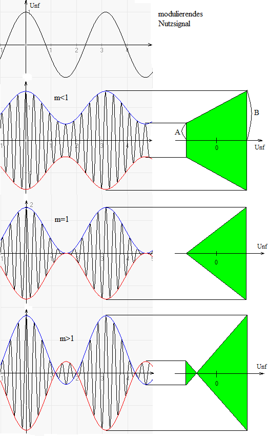 Modulationsgrad und Modulationstrapez, stellt das modulierte Signal in drei verschiedenen Modulationsgraden dar (0.5, 1, 1.5), daneben ist jeweils das resultierende Modulationstrapez abgebildet